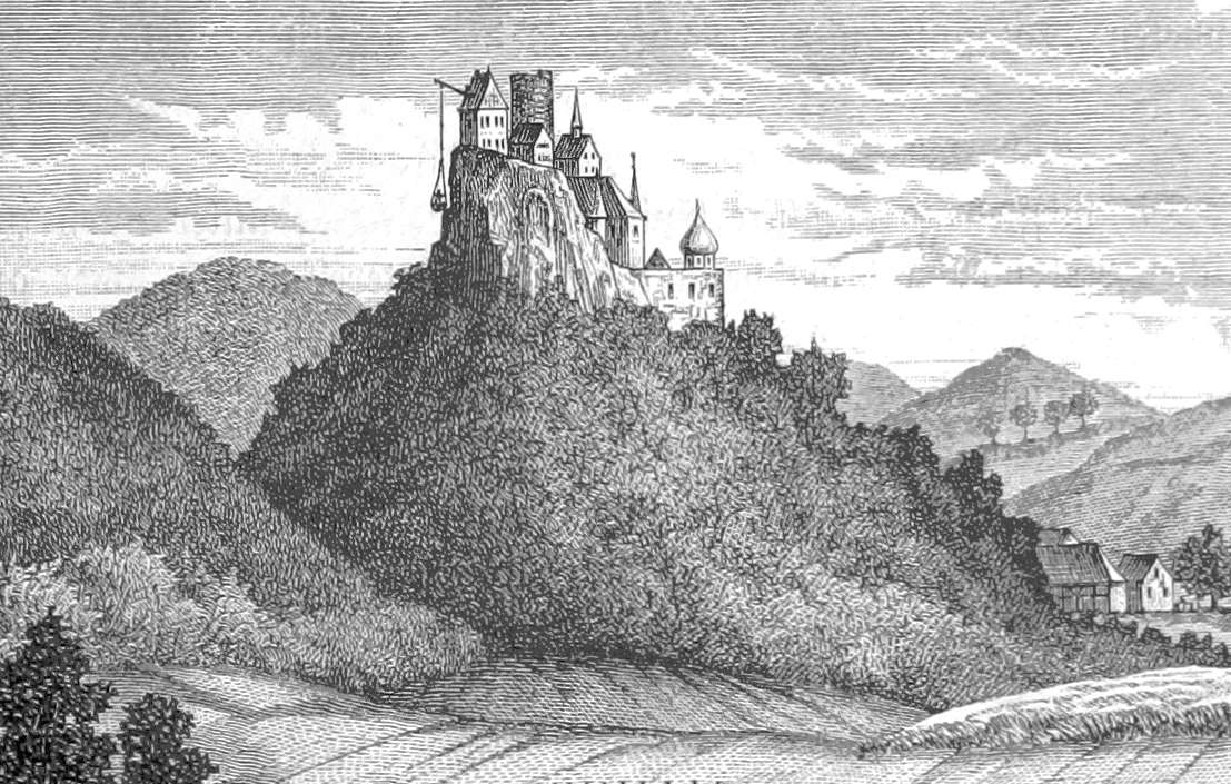 Flucht von Scharzfels 1697 durch Eleonore von dem Knesebeck